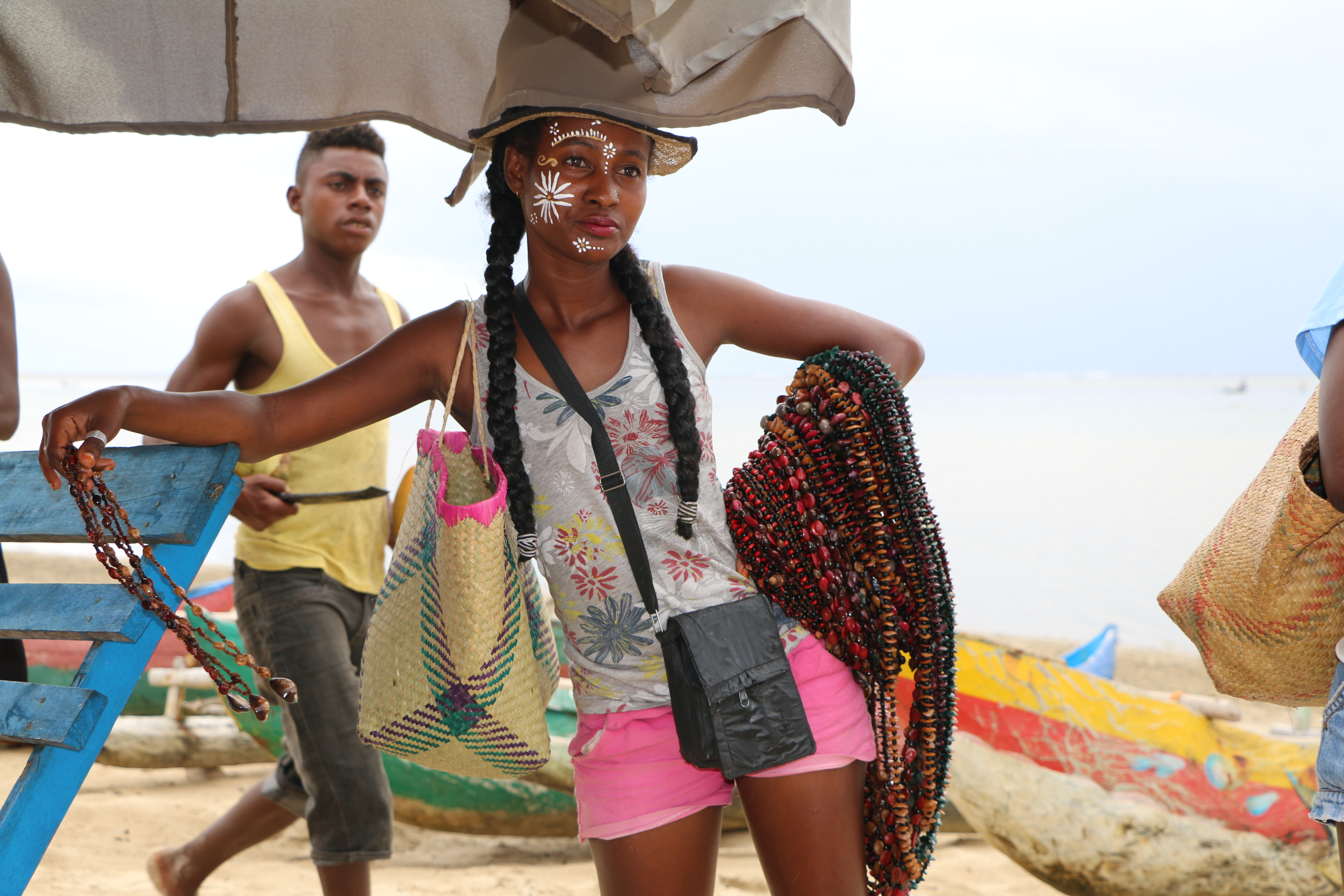 女孩手上挂着用椰子做的项链，正在等待来海边休闲度假的顾客 This is an image of "African people at work" from Madagascar